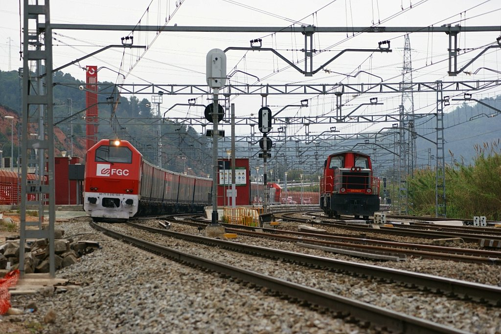 [CAT]: Fa uns dies vaig penjar la mateixa foto però en format HDR, ara es el torn de la foto sense tractament. Els ex 310.103 i 310.104 re-numerats per FGC com 353.03 i 353.04 passant per l'estació de Castellbisbal en direcció a la factoria de la SEAT. [ES]: Hace días colgué la misma foto pero en formato HDR, ahora es el turno de la foto sin tratamiento. Los ex 310.103 y 310.104 renumerados por FGC como 353.03 y 353.04 pasando por la estación de Castellbisbal en dirección a la factoría de la SEAT.